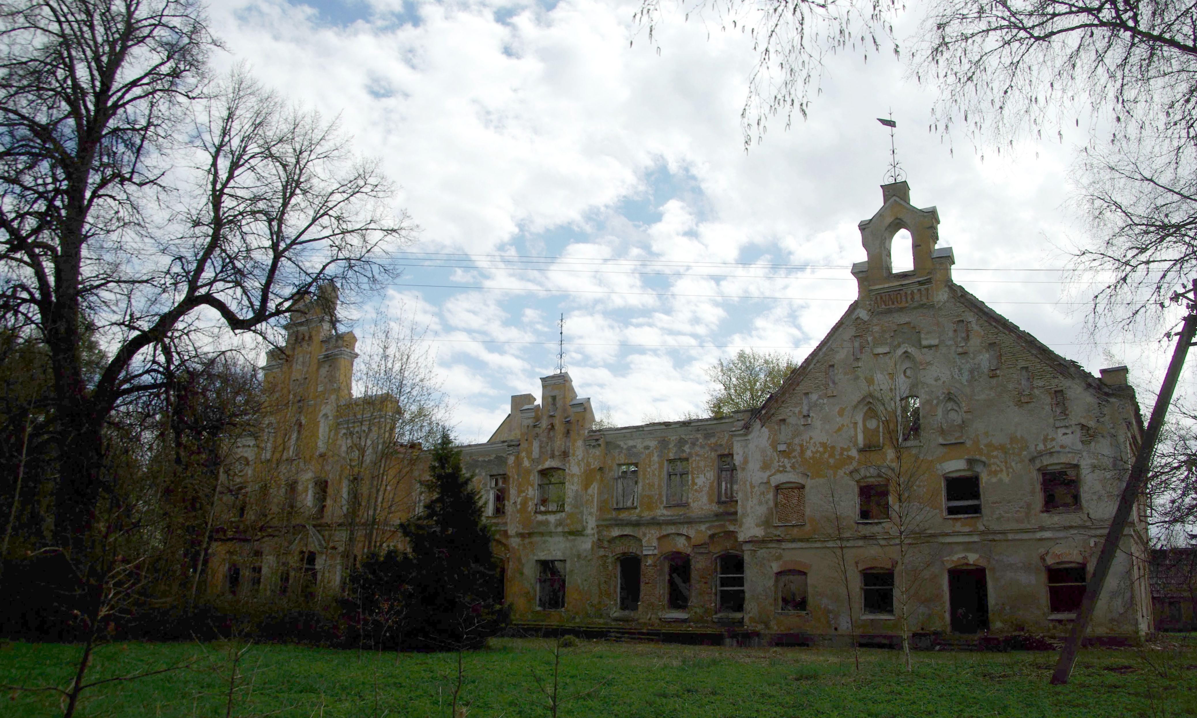 Aavere mõisa peahoone